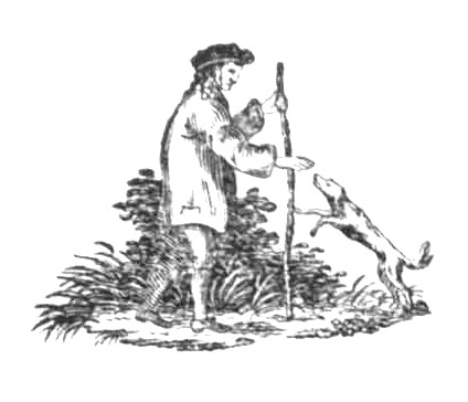 Luise Duttenhofer / Holzschnitt: Johann Wilhelm Gottlieb Pfnor: Ode auf die Freundschaft (1821), schwarzer Scherenschnitt, Eingangsvignette für das Gedicht „Ode auf auf die Freundschaft“ aus dem Gedichtband „Lautentöne“ von Christian Gottlob Vischer. Ein Mann mit lockigen Haaren und einem Barett auf dem Kopf, bekleidet mit einer kurzen Jacke und Hosen, steht auf einem Wiesenstück vor einem Busch. Er stützt sich auf einen mannshohen Holzstab, an dem freudig sein Hund, der „beste Freund des Menschen“ hochspringt. Luise Duttenhofer besaß selbst einen Hund namens Mylord, den sie sehr liebte.